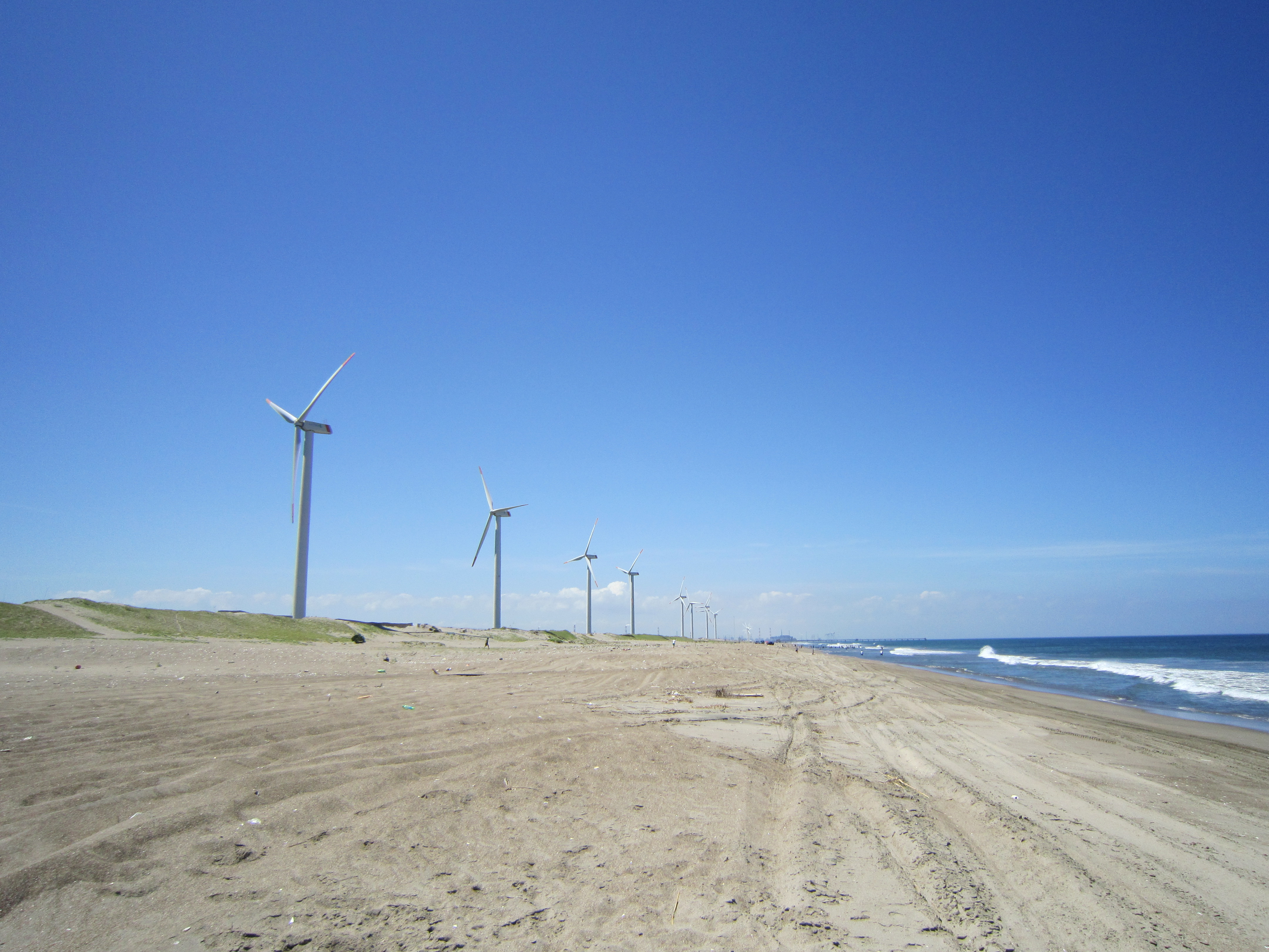 波崎ウィンドファームと波崎海岸（神栖市）